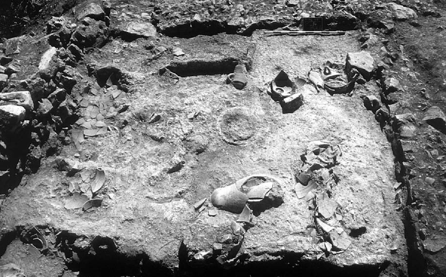 Nivel de destrucción de l'Alt de Benimaquia. s. VI a.C.